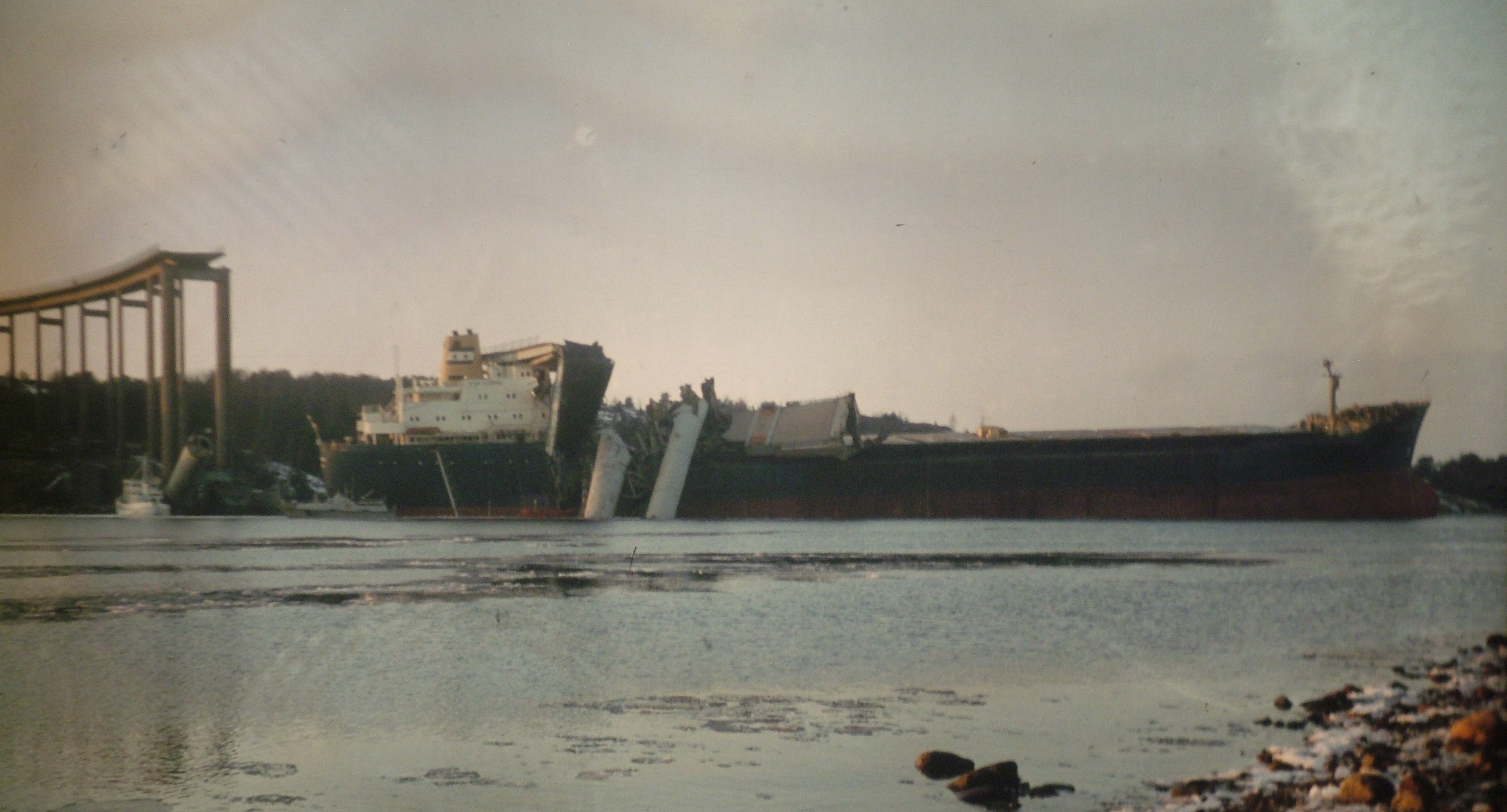 Fotat i från Källön / Stenungsund-sidan